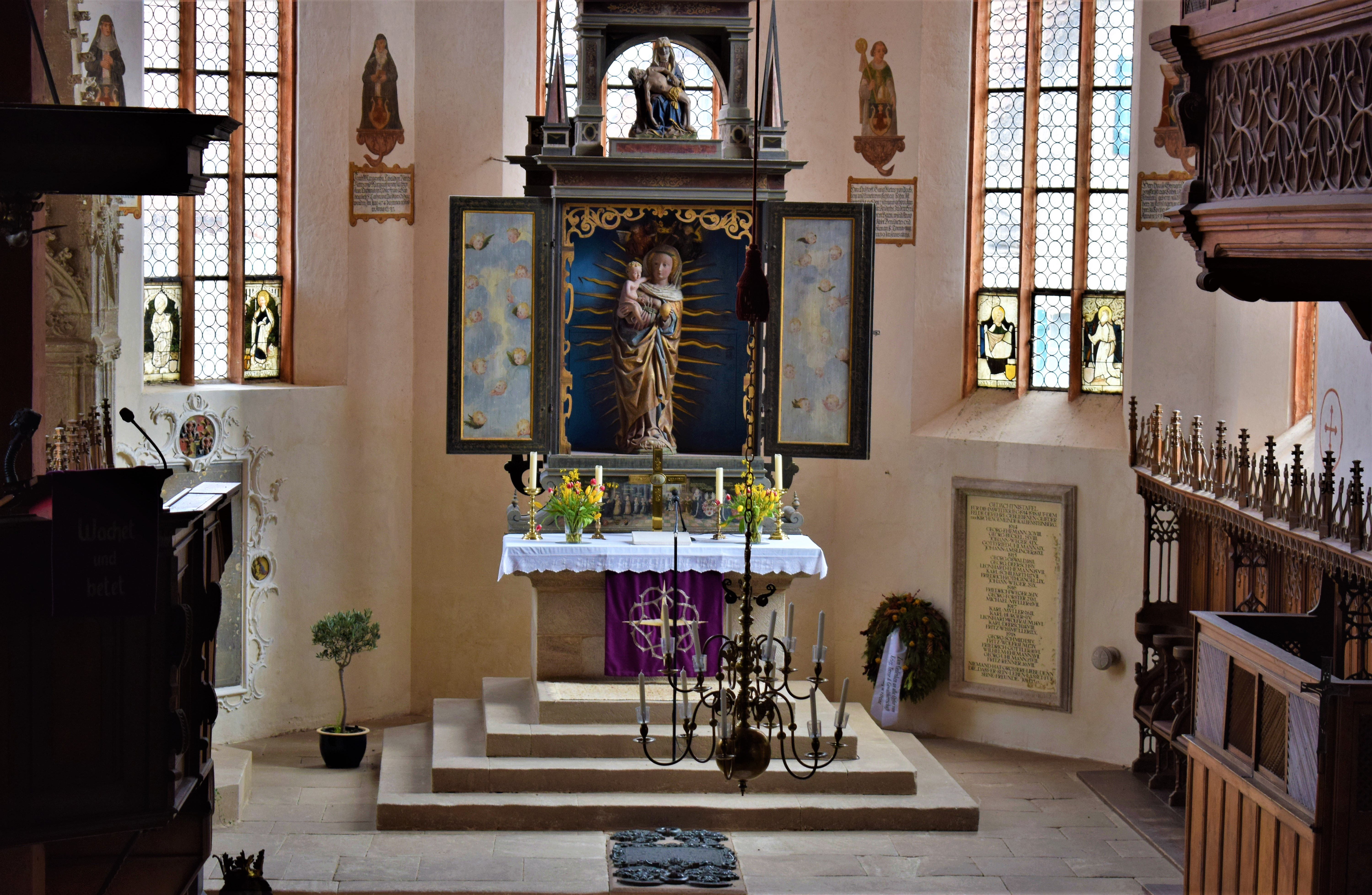 Rieterkirche Kalbensteinberg, Hochaltar (Detail), Renaissanceaufbau (1611) unter Verwendung älterer Figuren: Madonna mit Kind und Pietà von 1470